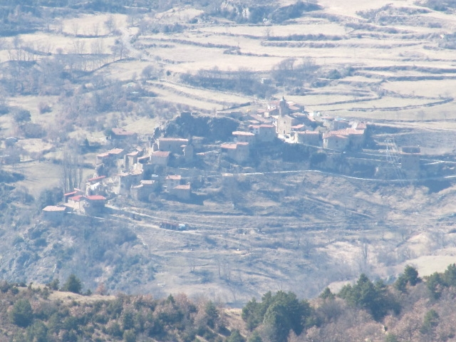 Bar (El Pont de Bar) vist des de Lles de Cerdanya (Baixa Cerdanya, Catalunya).